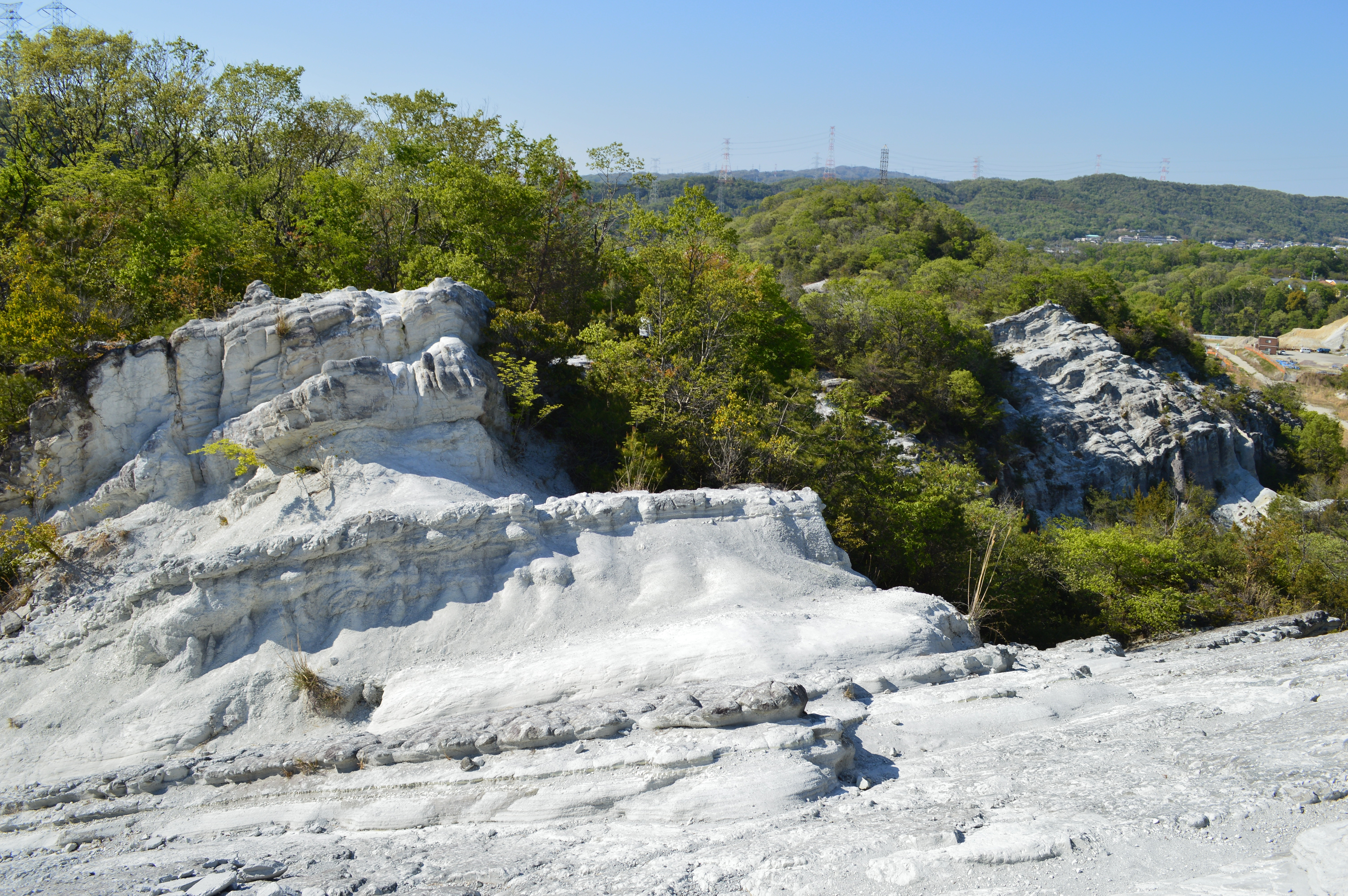 屯鶴峯 概観 Nikon D3200